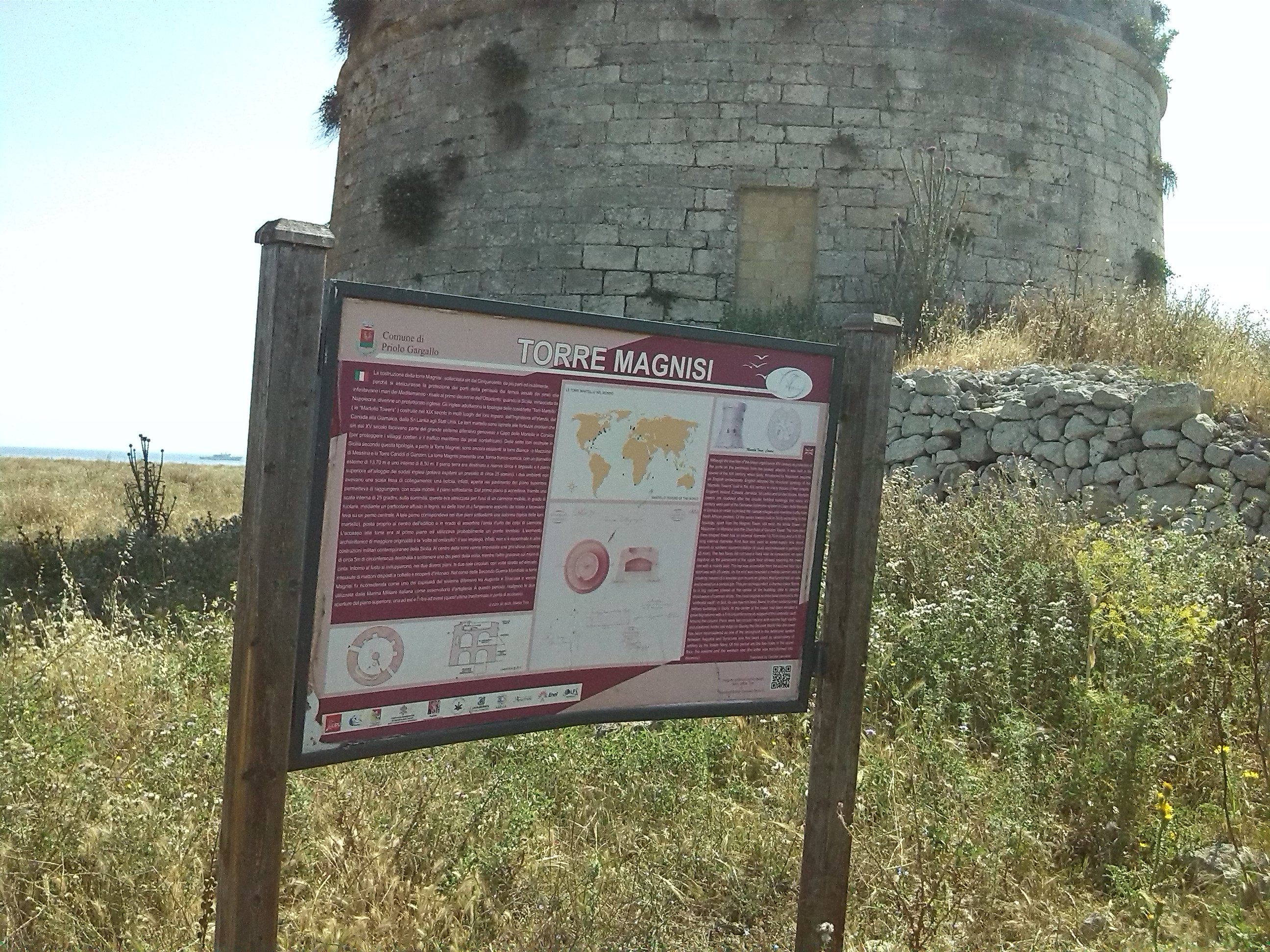 La zona e'purtroppo nel completo abbandono da anni